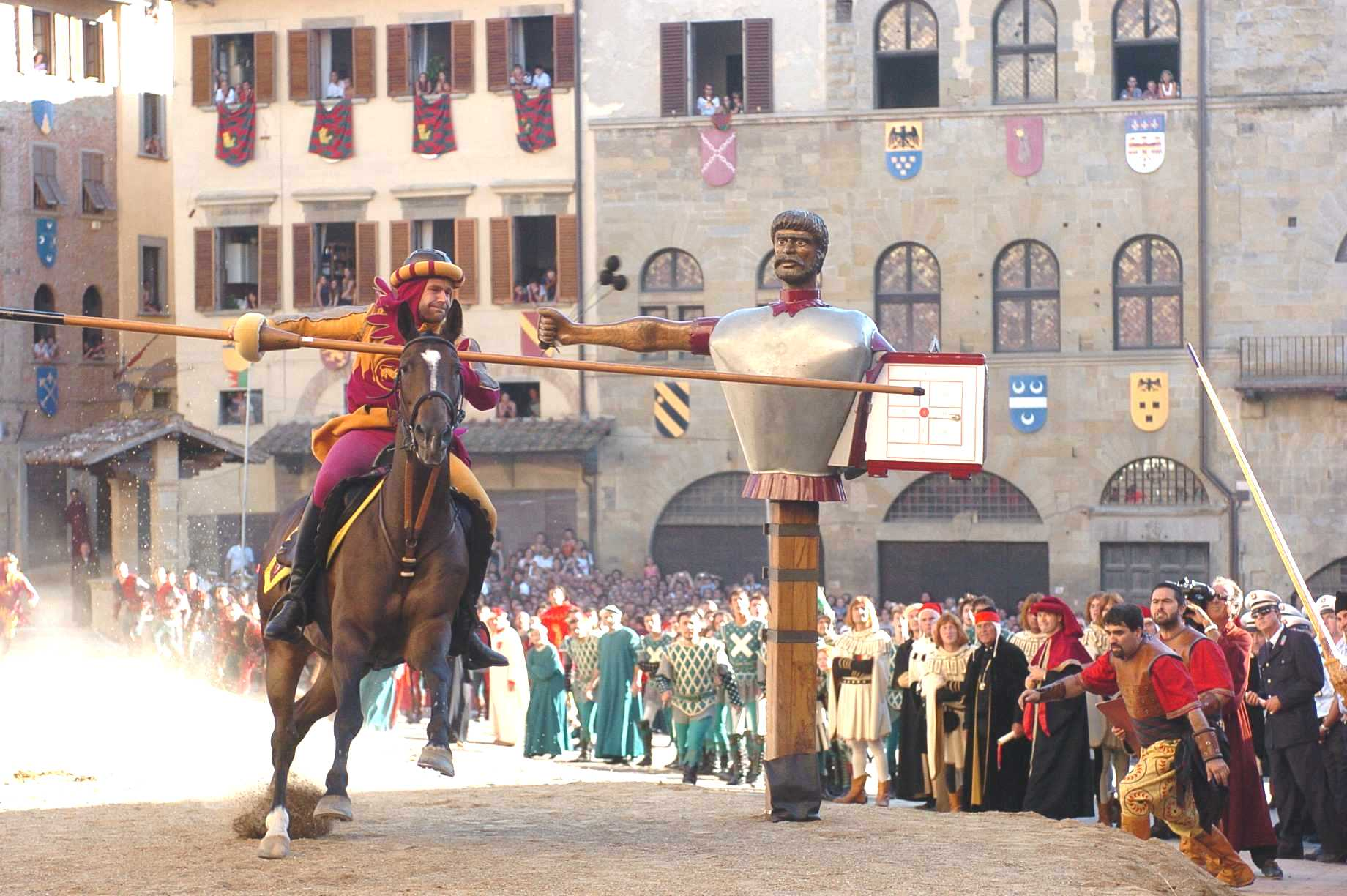 Carriera del Cavaliere di Porta del Foro, Giostra del Saracino, Arezzo, Italy